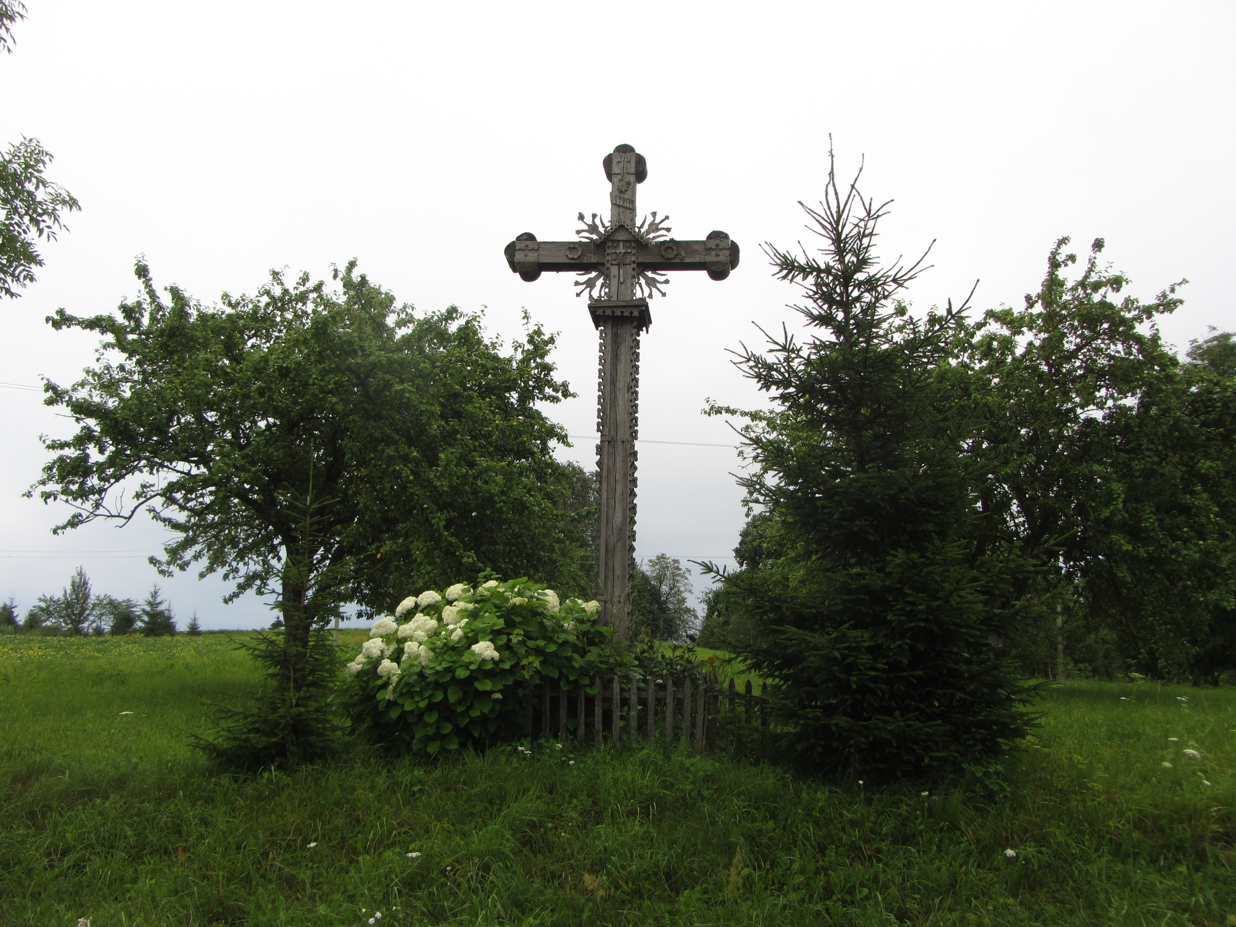 Daugailių sen., Lithuania